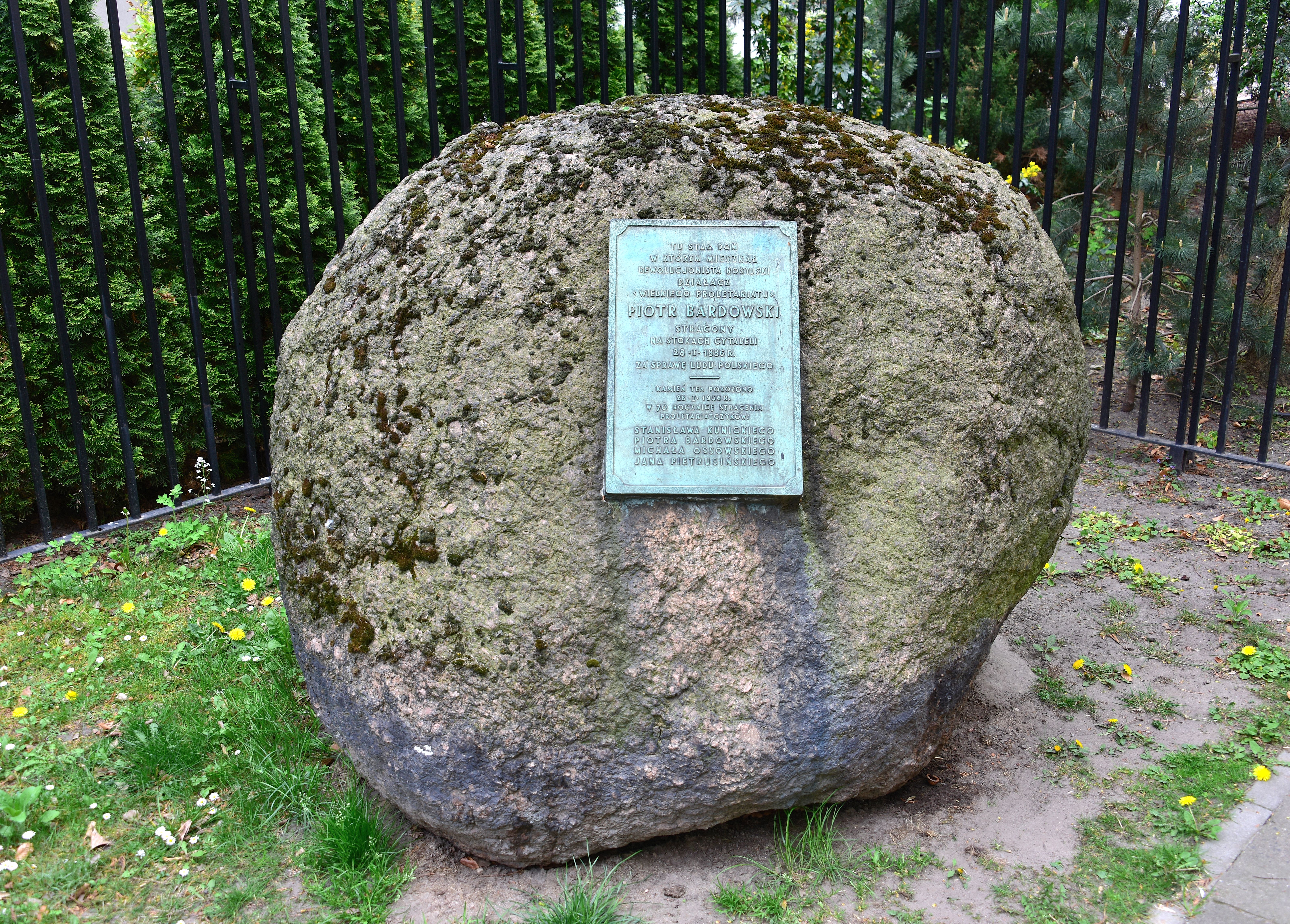 Kamień upamiętniający Piotra Bardowskiego przy ul. Konwiktorskiej róg ul. Zakroczymskiej w Warszawie